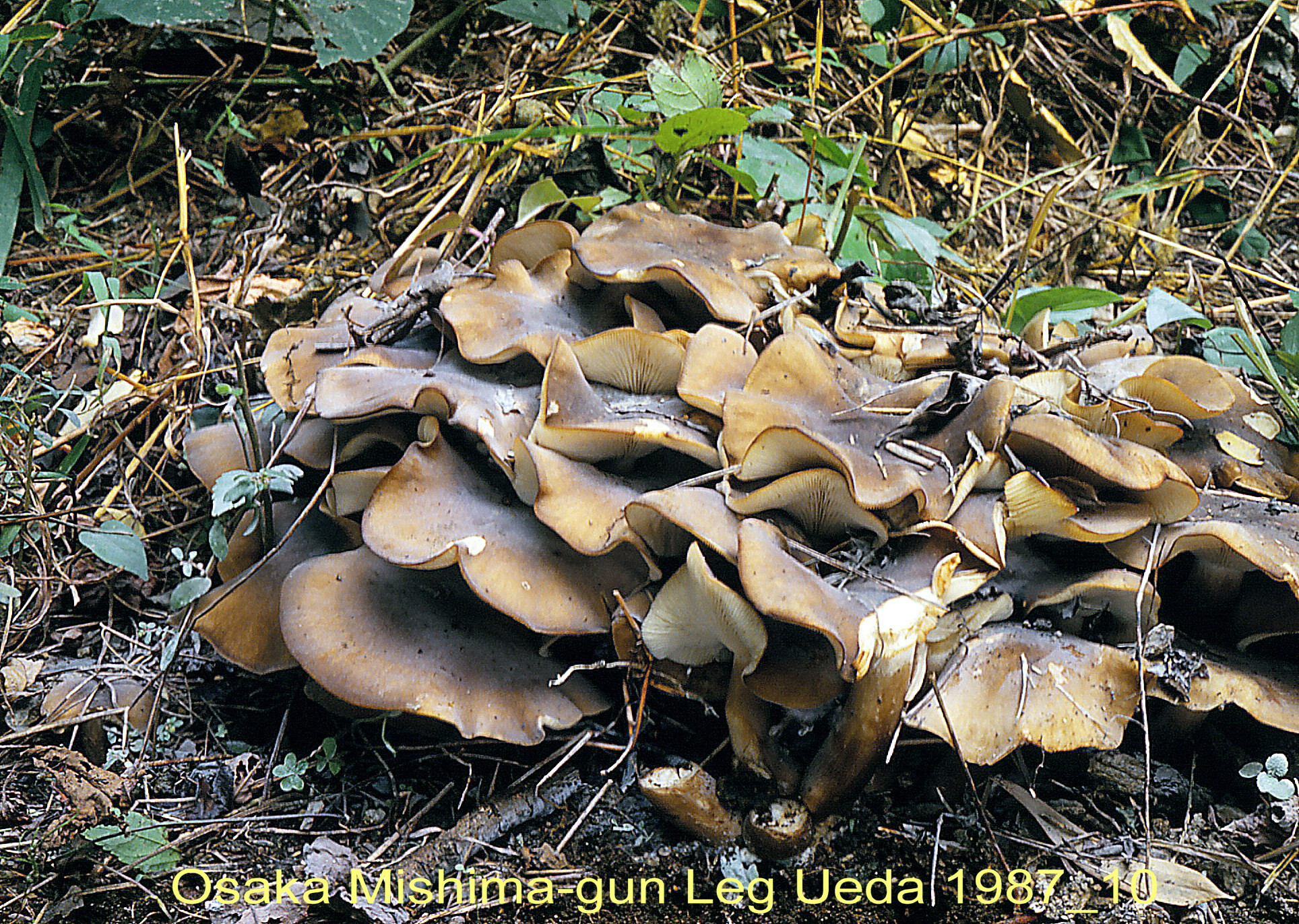 Leg et det Toshiho Ueda Sensei 1987 10 Osaka ensis vocation rudérale très nette avec cette récolte conforte le nom nippon Hataké-shimeji